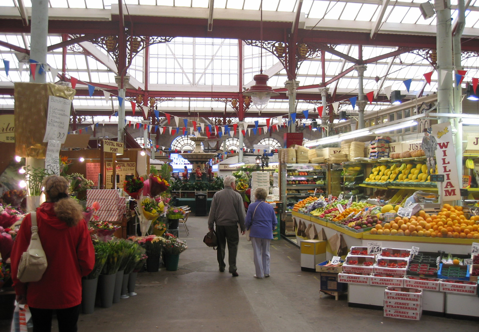 Markthalle in St. Helier, Hauptstadt von Jersey, Kanalinseln